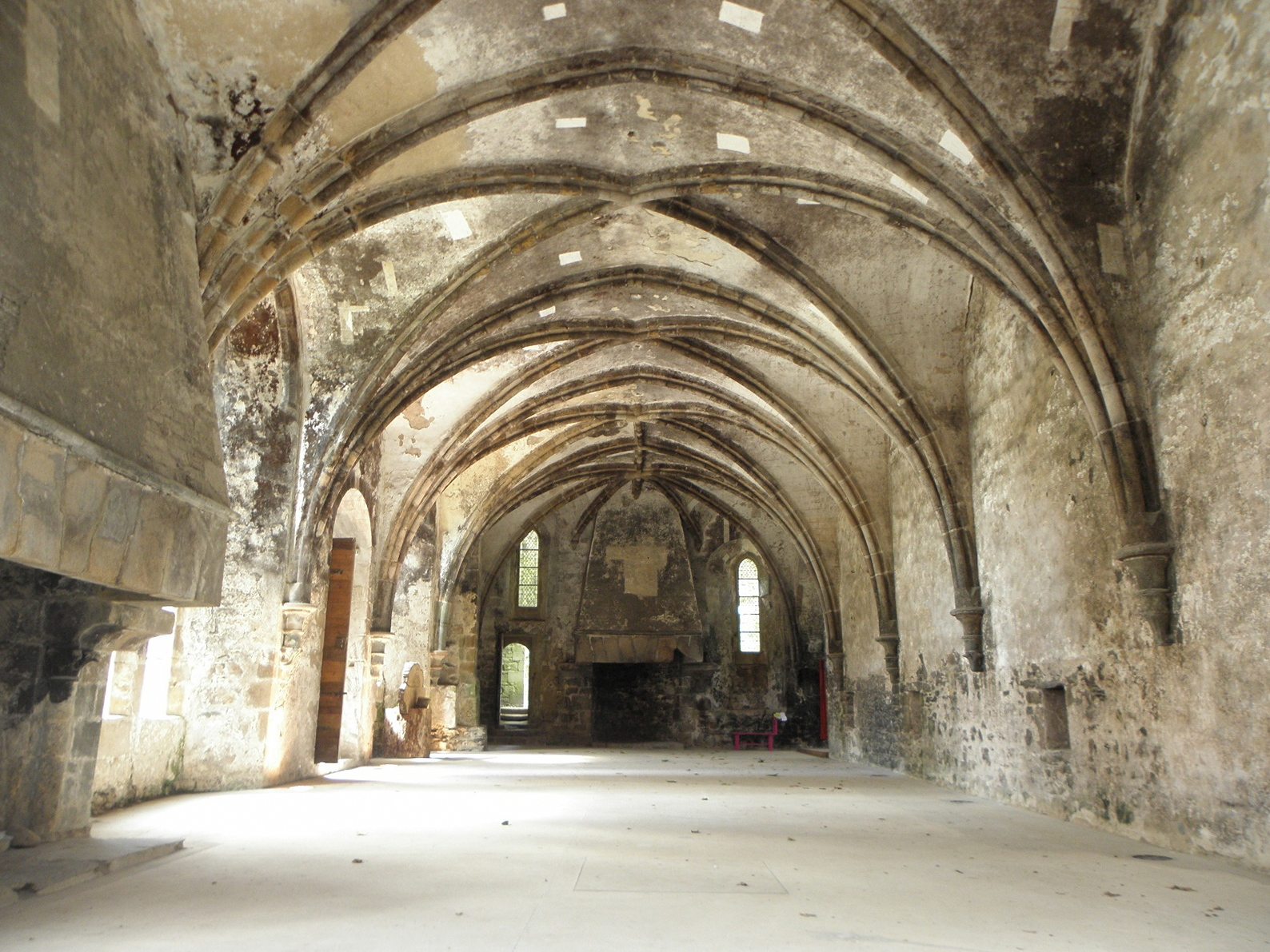 Salle au Duc de l'abbaye de Beauport en Paimpol (22). .